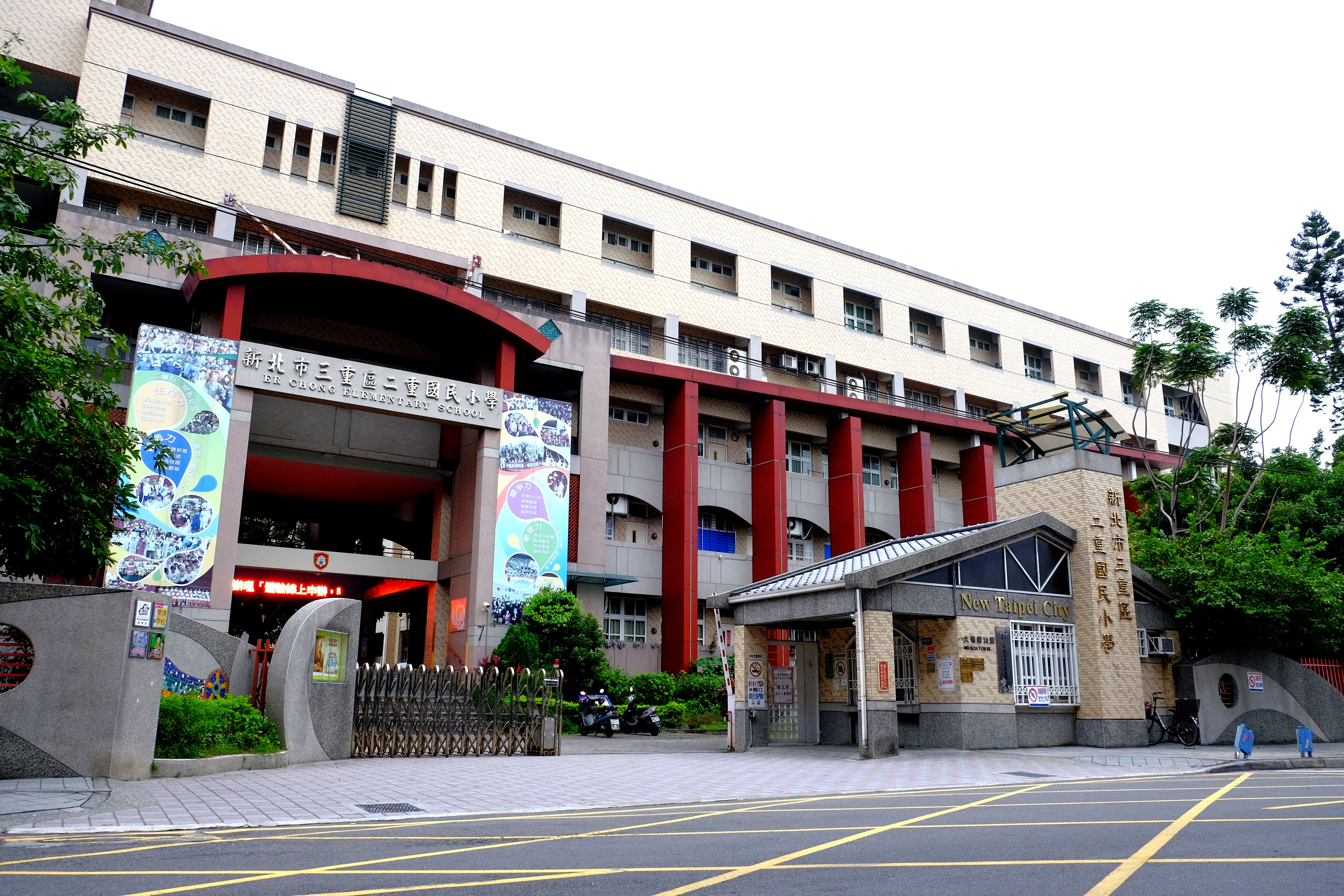 新北市三重區二重國民小學